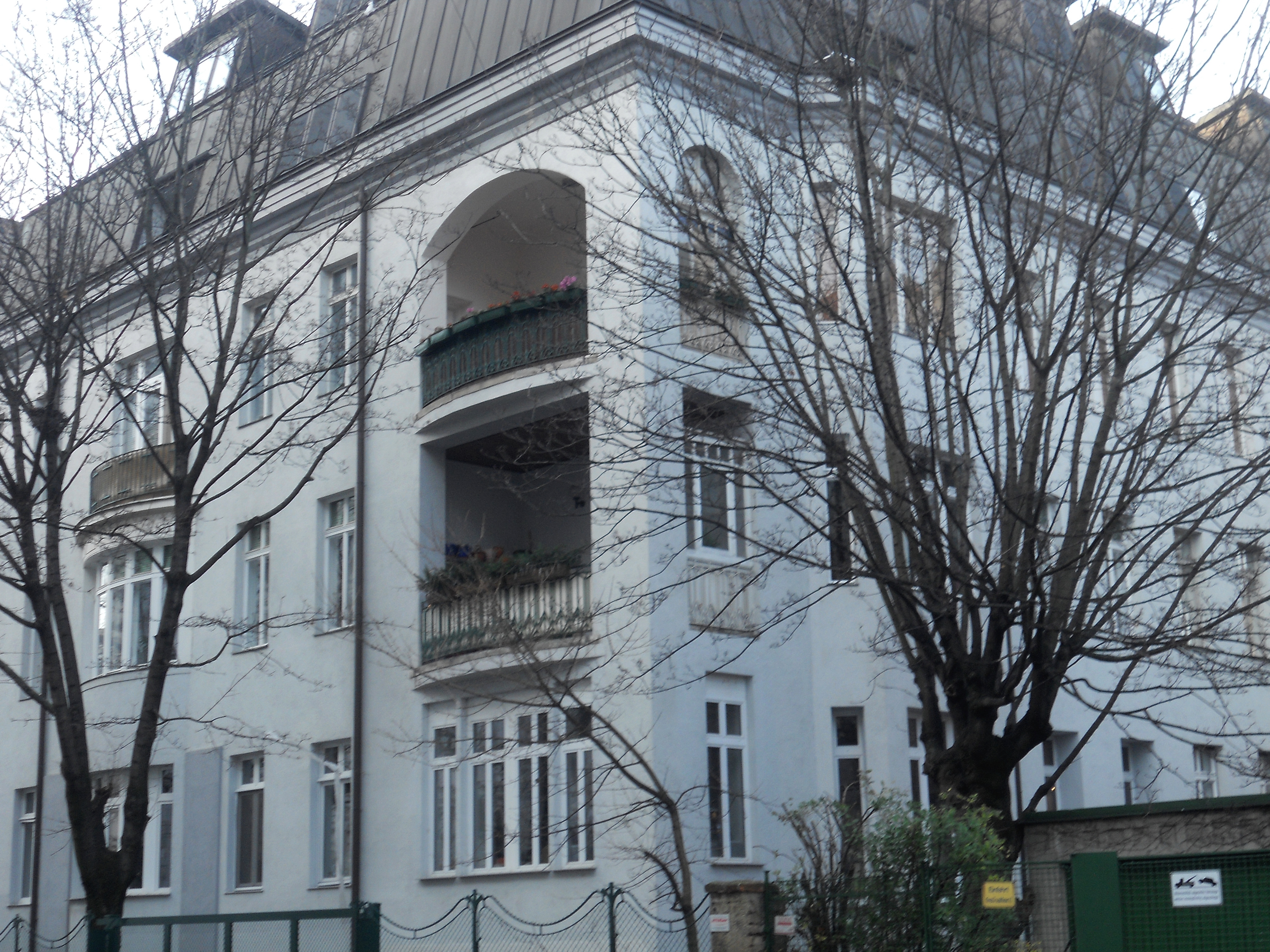 Haus Böcklinstraße 59 in Wien, erbaut 1904 von Oskar Marmorek